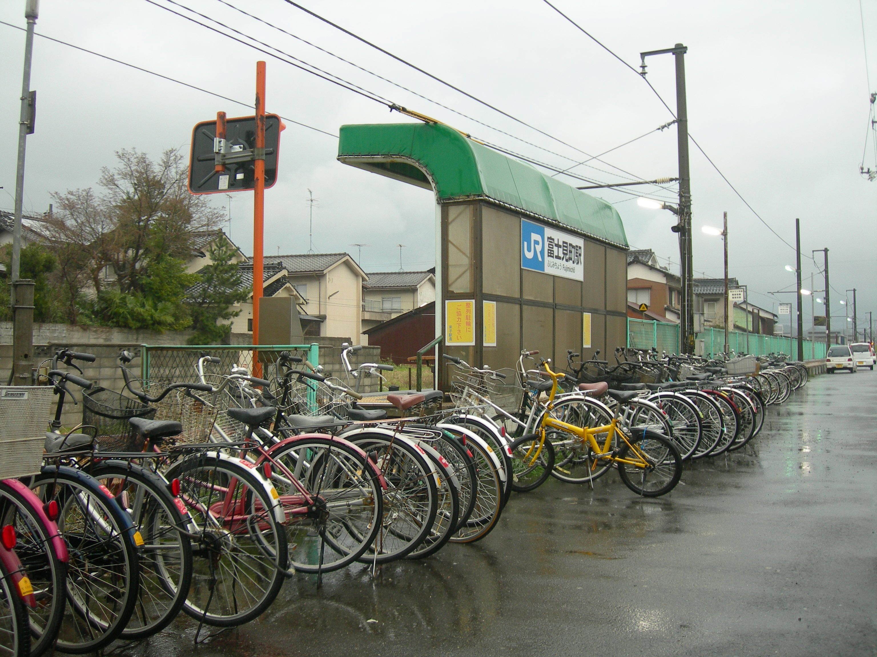 富士見町駅